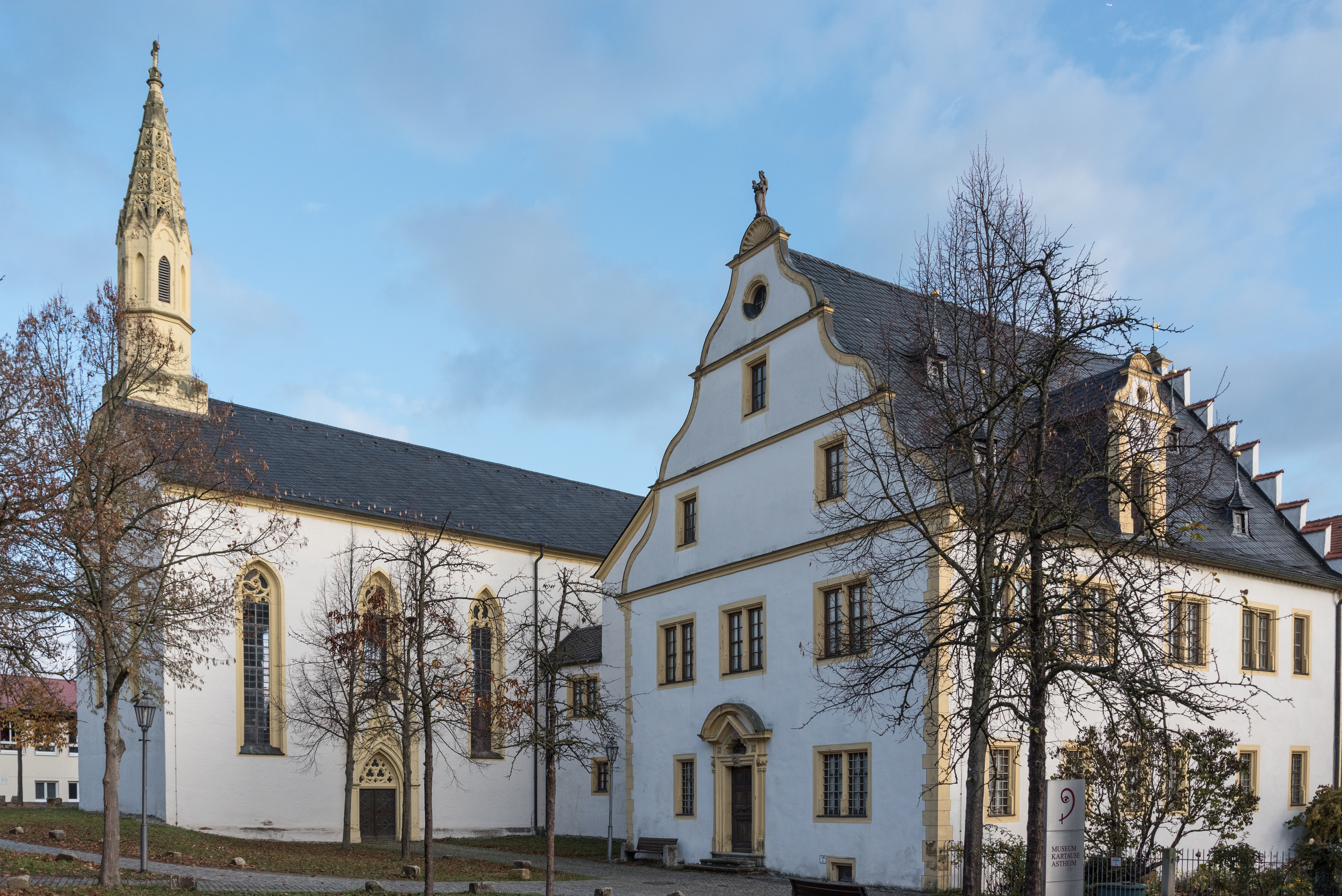 Volkach, Astheim, Kartäuserstraße 16, 14, Klosterkirche und Konventsbau